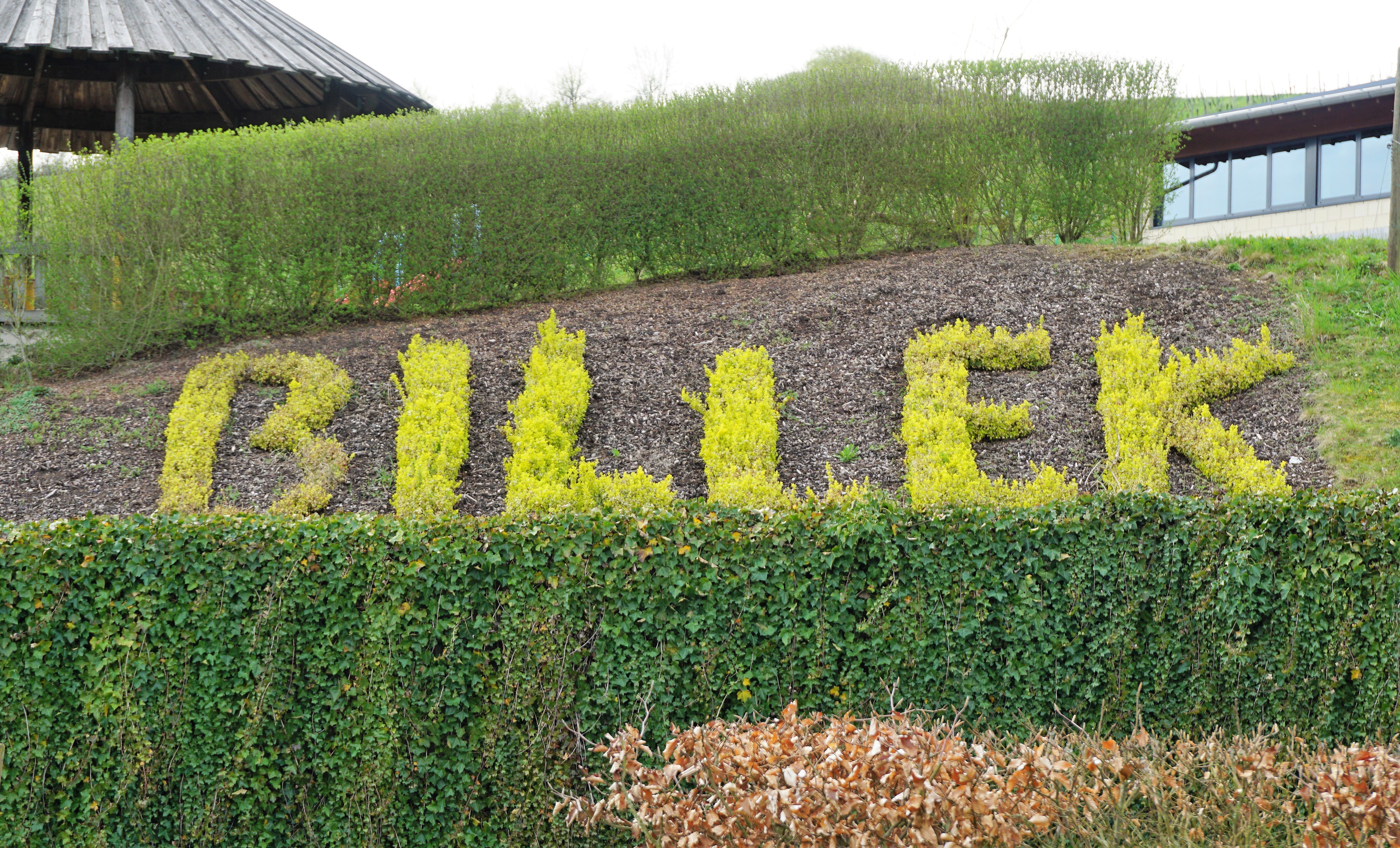 Dreiborn, commune de Wormeldange. "Billek".